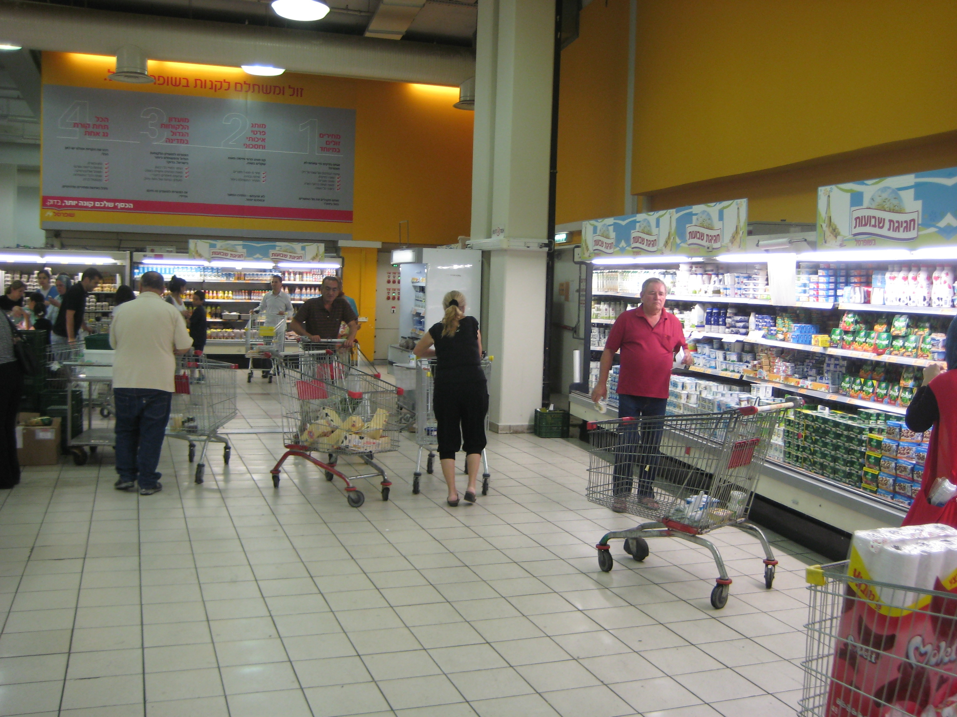 קונים בתוך סניף של רשת השיווק שופרסל